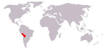 Bewerking afbeelding: Afbeelding_(kaart).JPG